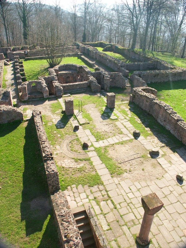 Michaelskloster auf dem Heiligenberg, Blick von einem der Westtürme auf die Ruine.